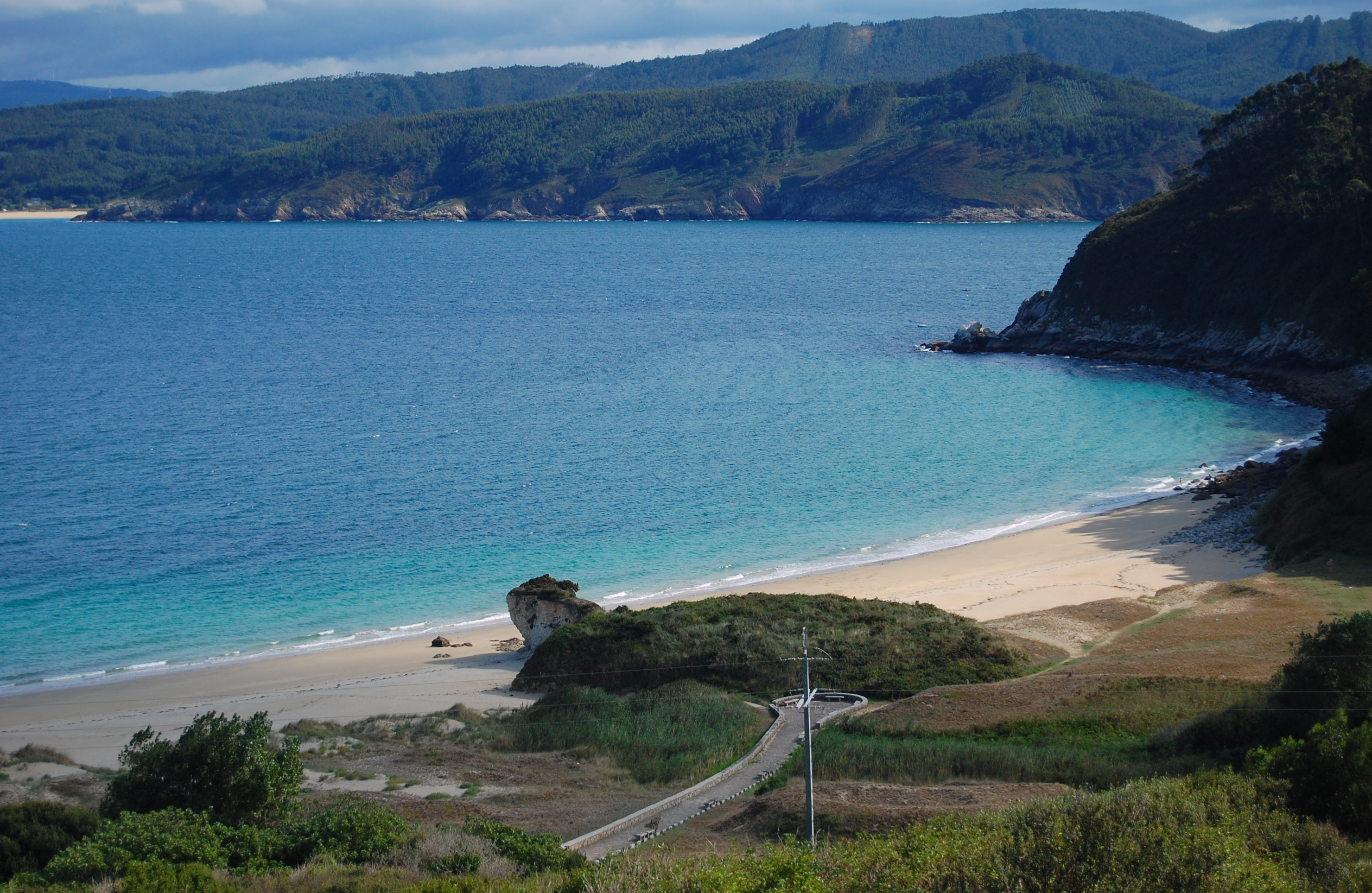 Praia de Bares, a máis nórdica de España, na ría do Barqueiro. Esta praia pertence ó Lugar de Importancia Comunitaria Estaca de Bares. Ó fondo poden apreciarse a praia de Xilloi, o monte Atalaia e as puntas do Balseiro, da Cova e Congreira, pertencentes ó LIC Costa da Mariña Occidental. A fotografía foi rotada en GIMP (-1.40º) This is a photography of a Special Area of Conservation in Spain with the ID: ES1110010. Natura2000 entry, EEA entry This is a photography of a Special Area of Conservation in Spain with the ID: ES1120017. Natura2000 entry, EEA entry